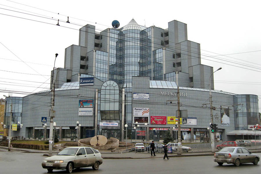 Бизнес-центр Меркурий в Волгограде